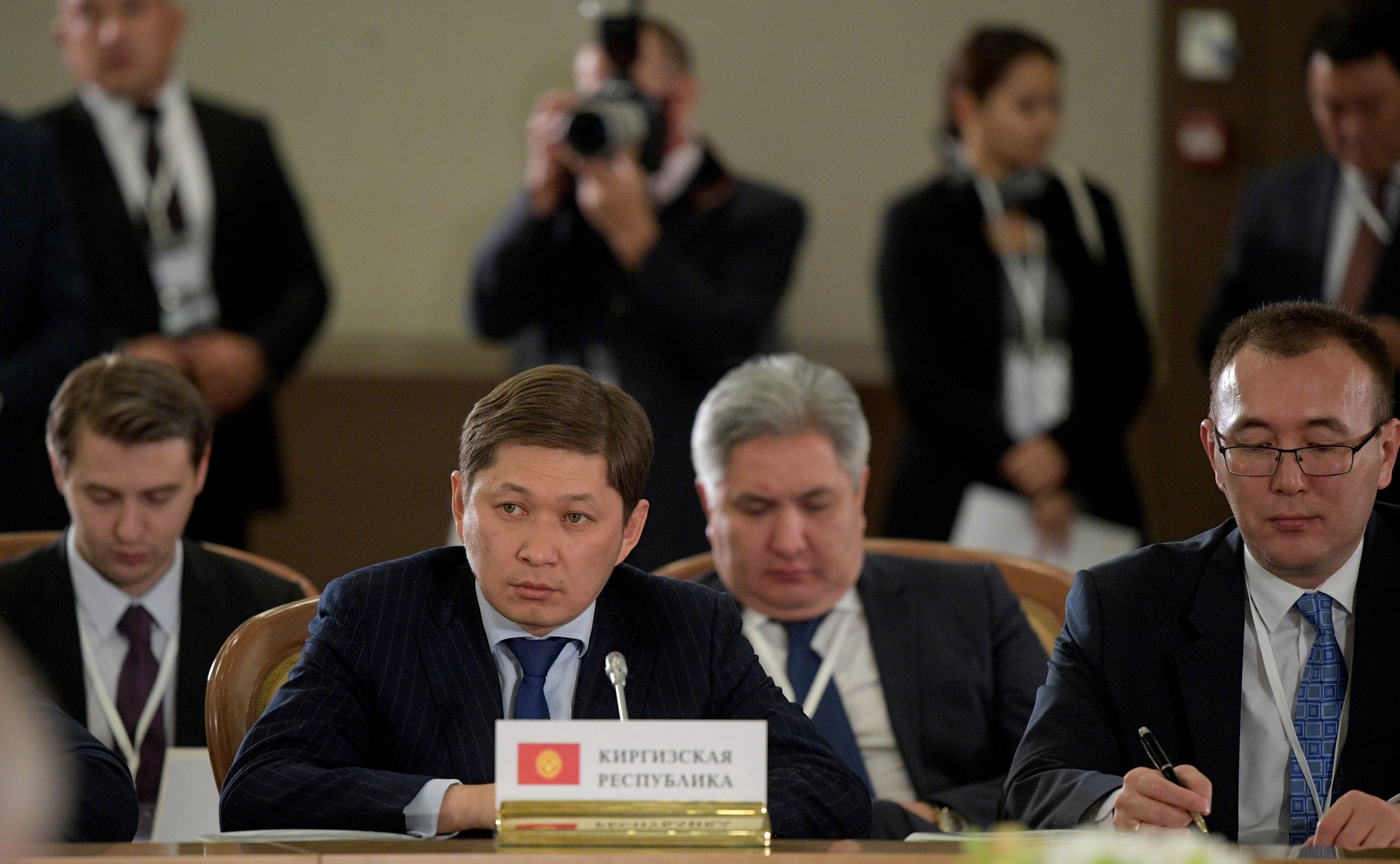 Премьер-министр Киргизии Сапар Исаков на заседании Высшего Евразийского экономического совета в расширенном составе